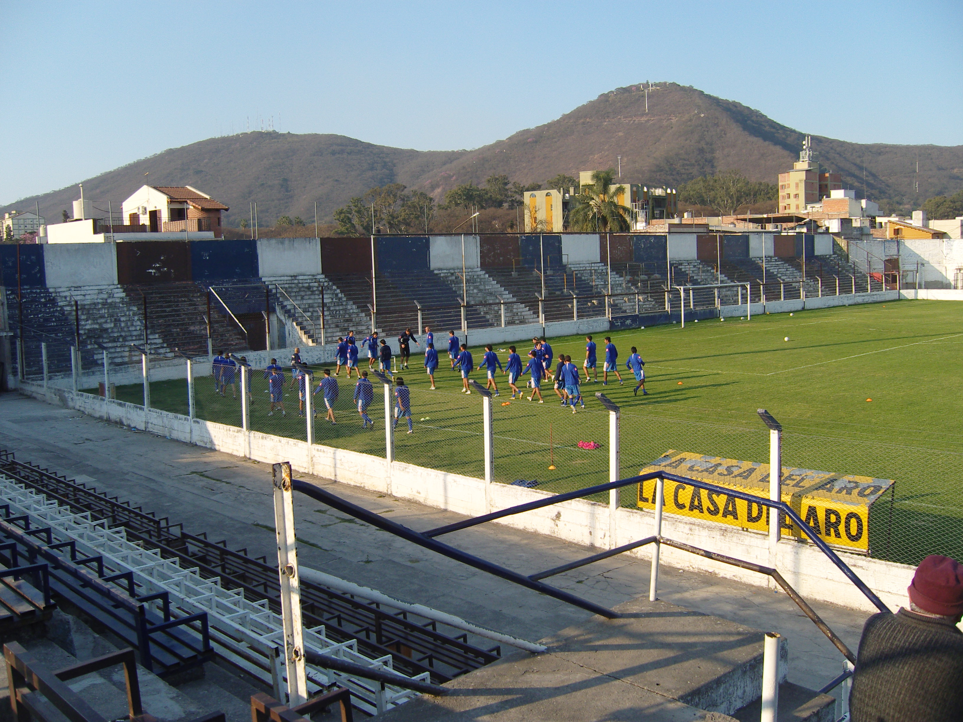 Foto de las tribunas de la Calle San Luis del Estadio Fray Honorato Pistoia.